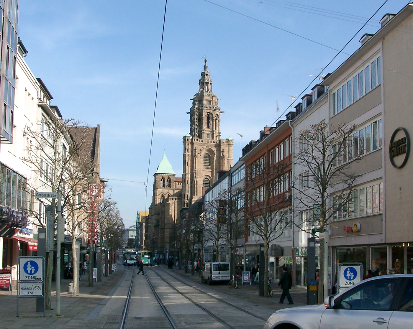 Heilbronn, Blick von der Kaiserstraße auf die Kilianskirche